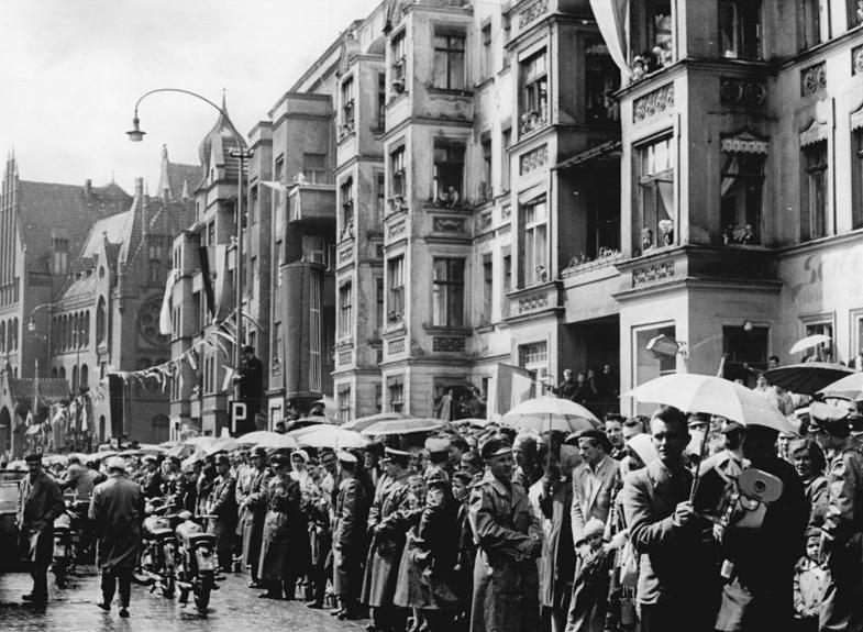 Friedensfahrt, Szczecin, Zuschauer Zentralbild Wendorf 8.5.1961 XIV. Internationale Friedensfahrt Warschau-Berlin-Prag 1961. 6. Etappe von Szczecin nach Rostock am 8.5.1961. UBz: Erstmalig in der Geschichte der Friedensfahrt konnten die Einwohner Szczecins den Friedensfahrern zujubeln. Tritz strömenden Regens säumten sie in den frühen Morgenstunden des 8.5.1961 die Straßen der Stadt und warteten mit Spannung auf den Startschuß der 6. Etappe.